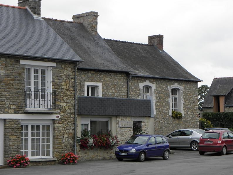 Mairie de Montreuil-des-Landes (35).